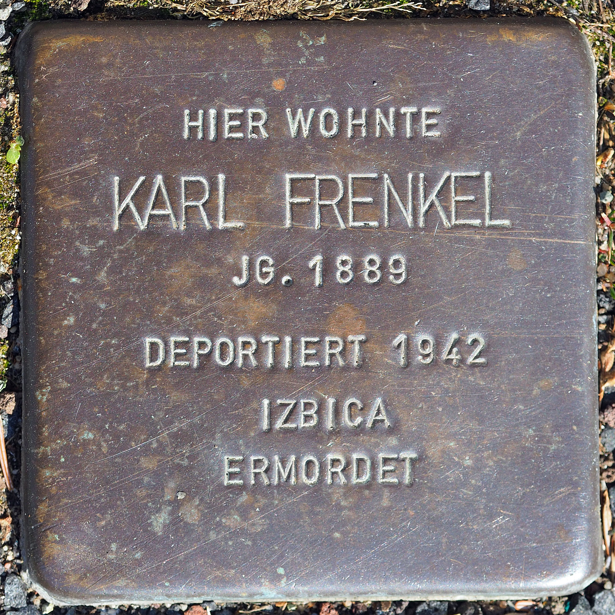 Stolpersteine MG: Frenkel, Karl